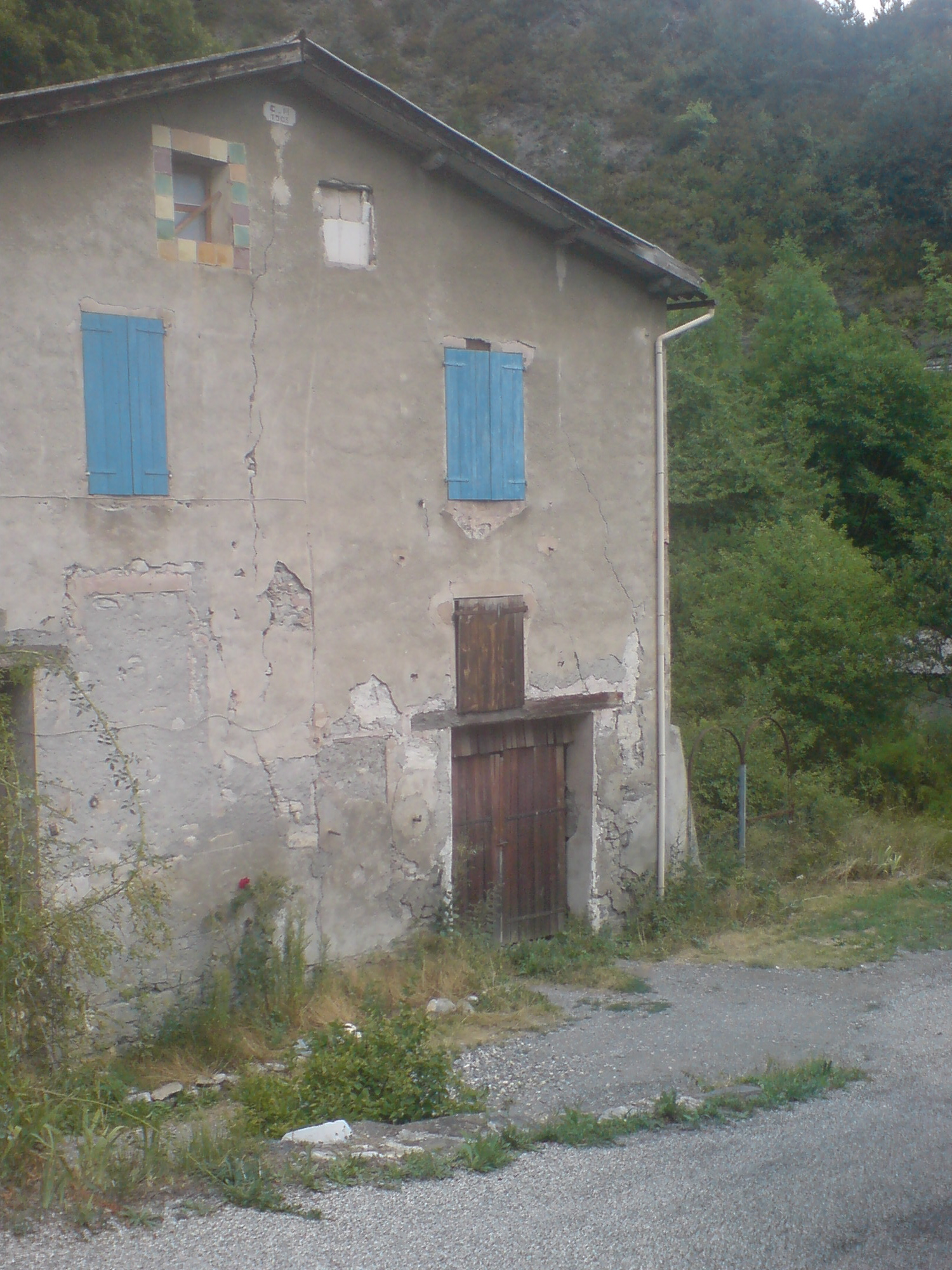 Ancien relais de poste, dans le village de Beaujeu